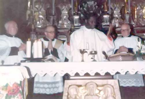 Il Cardinal Gantin durante una celebrazione liturgica a San Fiorano (LO) Italia